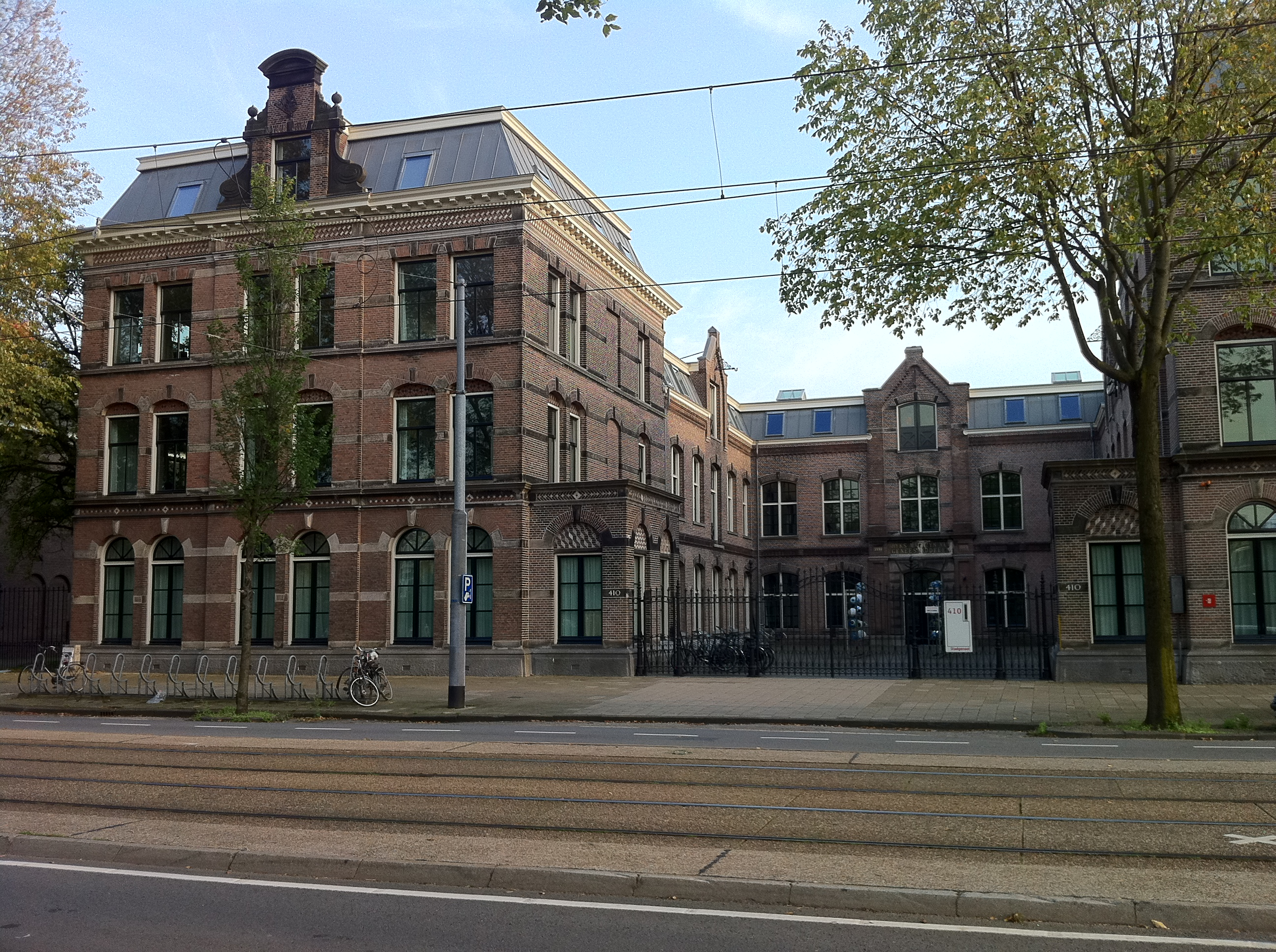 Amsterdam - Sarphatistraat 410, Rijksmagazijn voor geneesmiddelen, tegenwoordig hoofdkantoor Stadgenoot